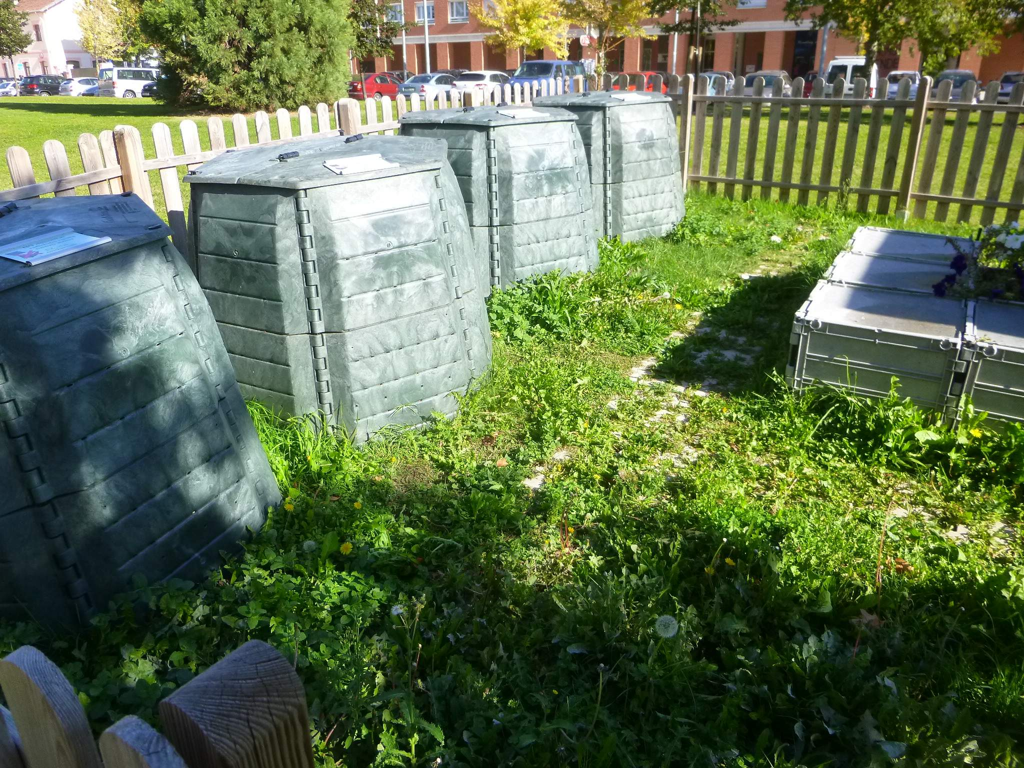 Pamplona - Reciclaje de residuos urbanos, área de compostaje urbano